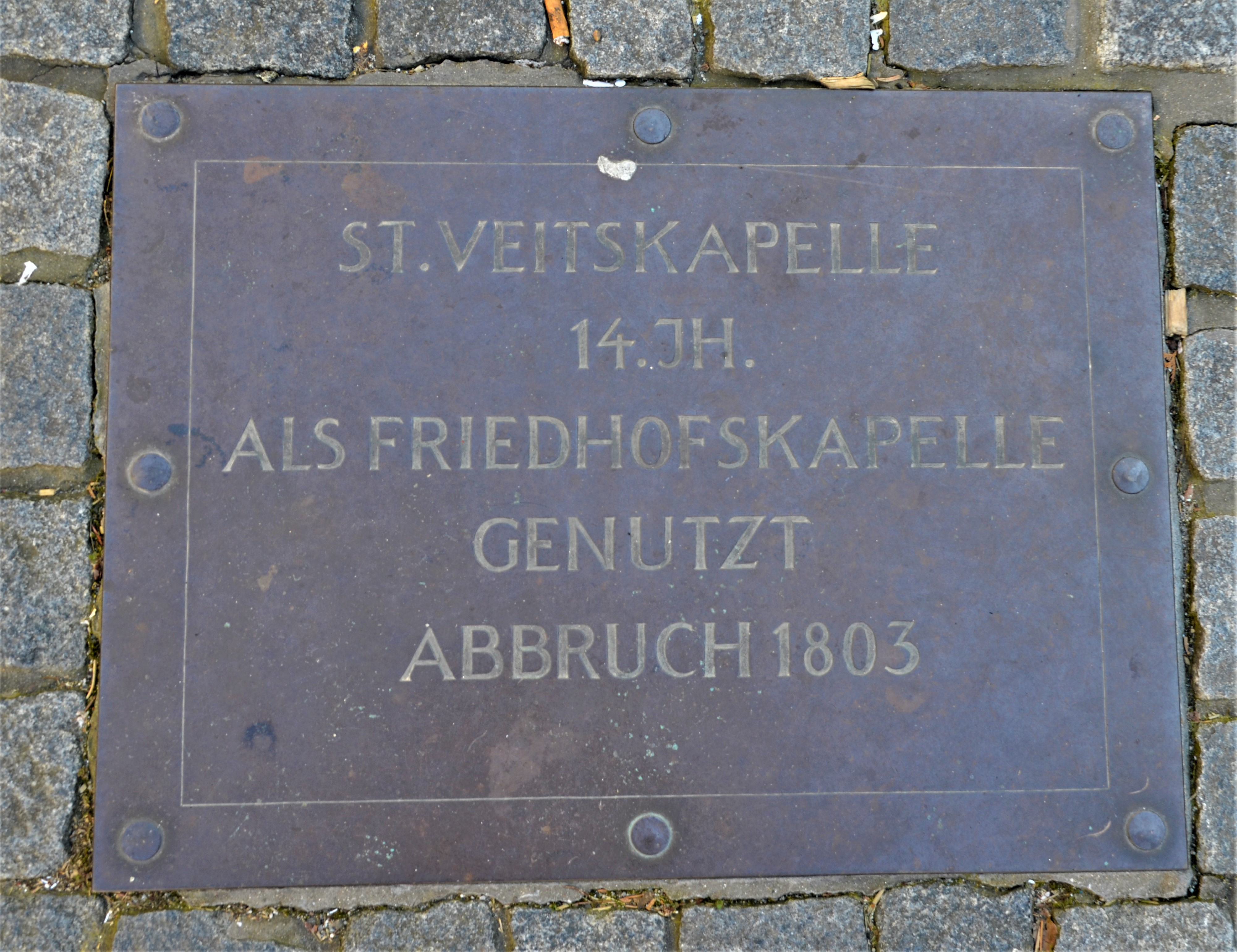 Hinweis auf die 1803 abgebrochene St. Veitskapelle in Schwäbisch gmünd (Johannisplatz)